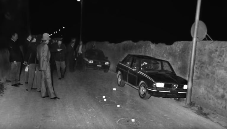 Il luogo dell'agguato